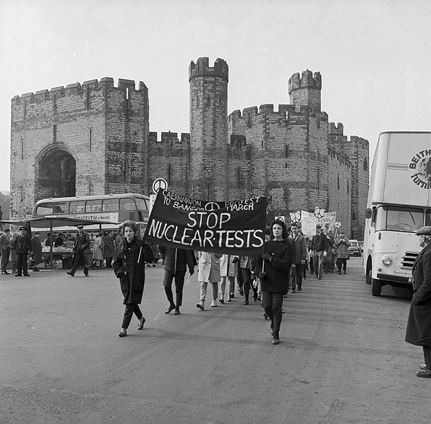 Teitl Cymraeg/Welsh title: Gorymdaith brotest yn erbyn bomiau niwclear o Gaernarfon i Fangor Ffotograffydd/Photographer: Geoff Charles (1909-2002) Dyddiad/Date: March 22, 1962. Cyfrwng/Medium: Negydd ffilm / Film negative Cyfeiriad/Reference: (gch26755) Rhif cofnod / Record no.: 3471223 Rhagor o wybodaeth am gasgliad Geoff Charles yn Llyfrgell Genedlaethol Cymru More information about the Geoff Charles Collection at the National Library of Wales